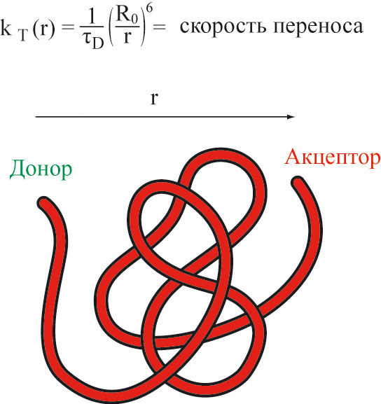 Внутримолекулярный перенос энергии в молекуле белка.